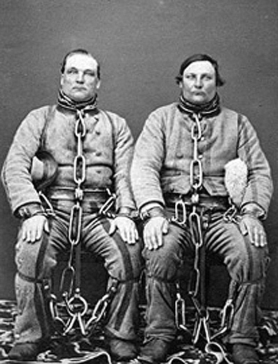 Kuvassa vas. Antti Rannanjärvi (1828–1882) ja Antti Isotalo (1831–1911)